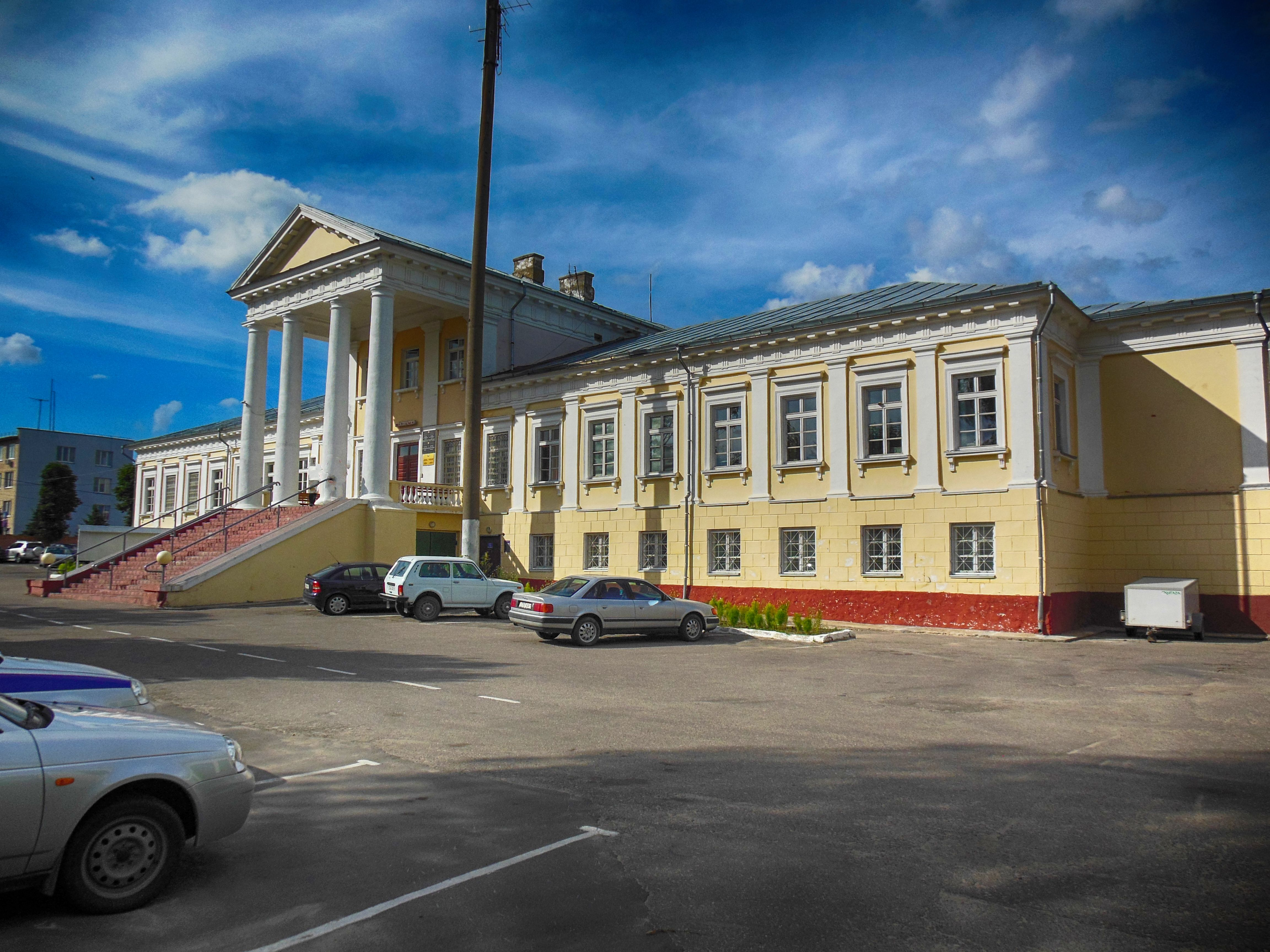 Беларуская (тарашкевіца): Ансамбль былой рэзыдэнцыі графаў Тышкевічаў: галоўны корпус два флігелі фрагмэнты парку. г. Валожын This is a photo of Belarusian heritage monument. Reference number: 612Г000075 ( WLM)